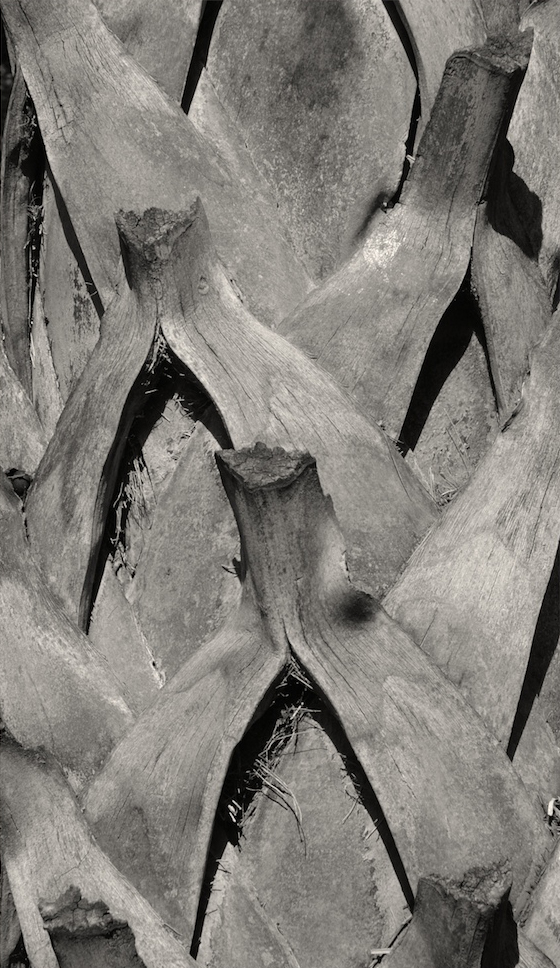 Sabal rosei